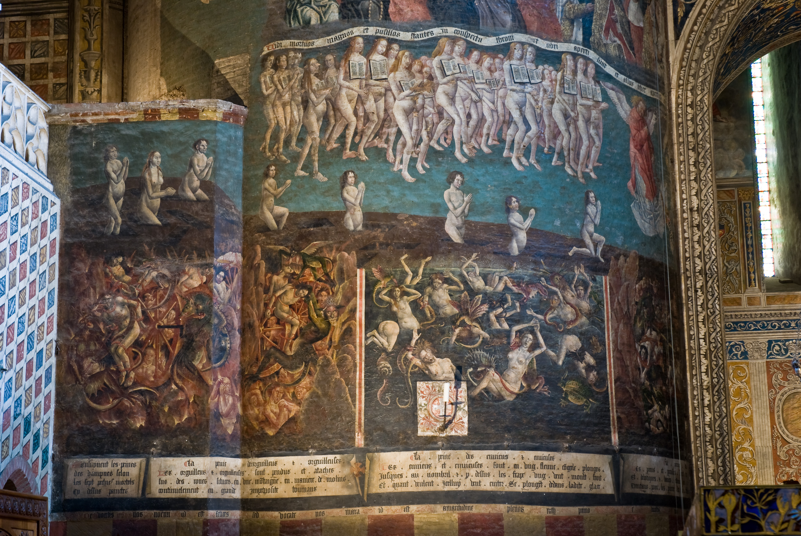 Détail de la fresque du "jugement dernier" ornant le pilier gauche, situé sous le buffet d'orgues (Cathédrale Sainte-Cécile, Albi)